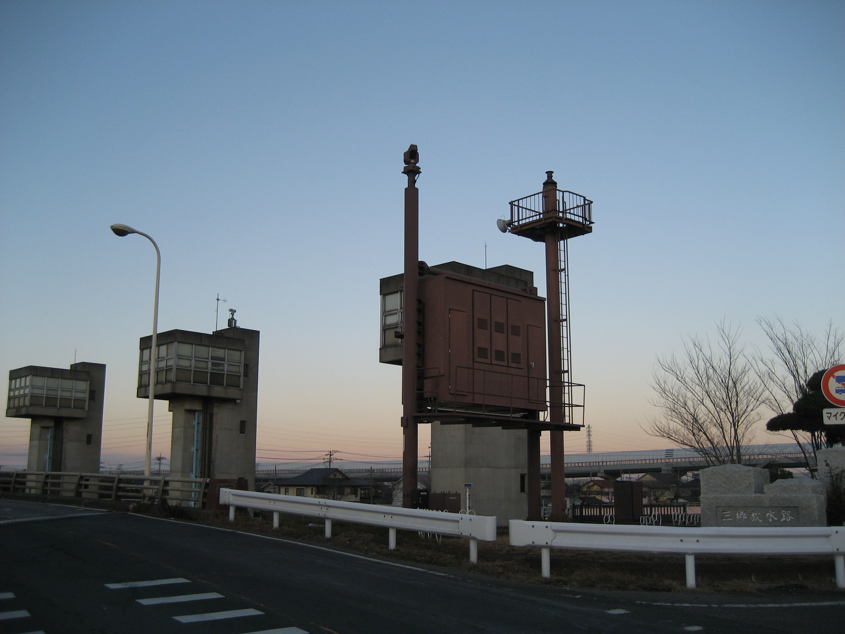 三郷放水路三郷水門付近